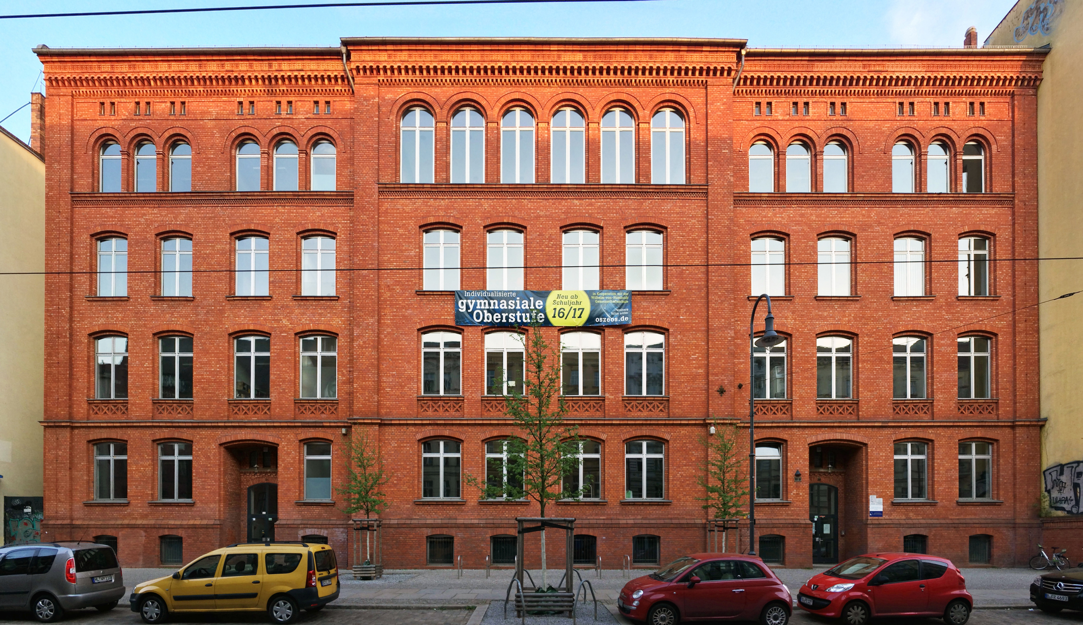 Oberstufenzentrum Elinor-Ostrom-Schule, Pappelallee, Prenzlauer Berg, Berlin, 1874, Hermann Wilhelm Albert Blankenstein